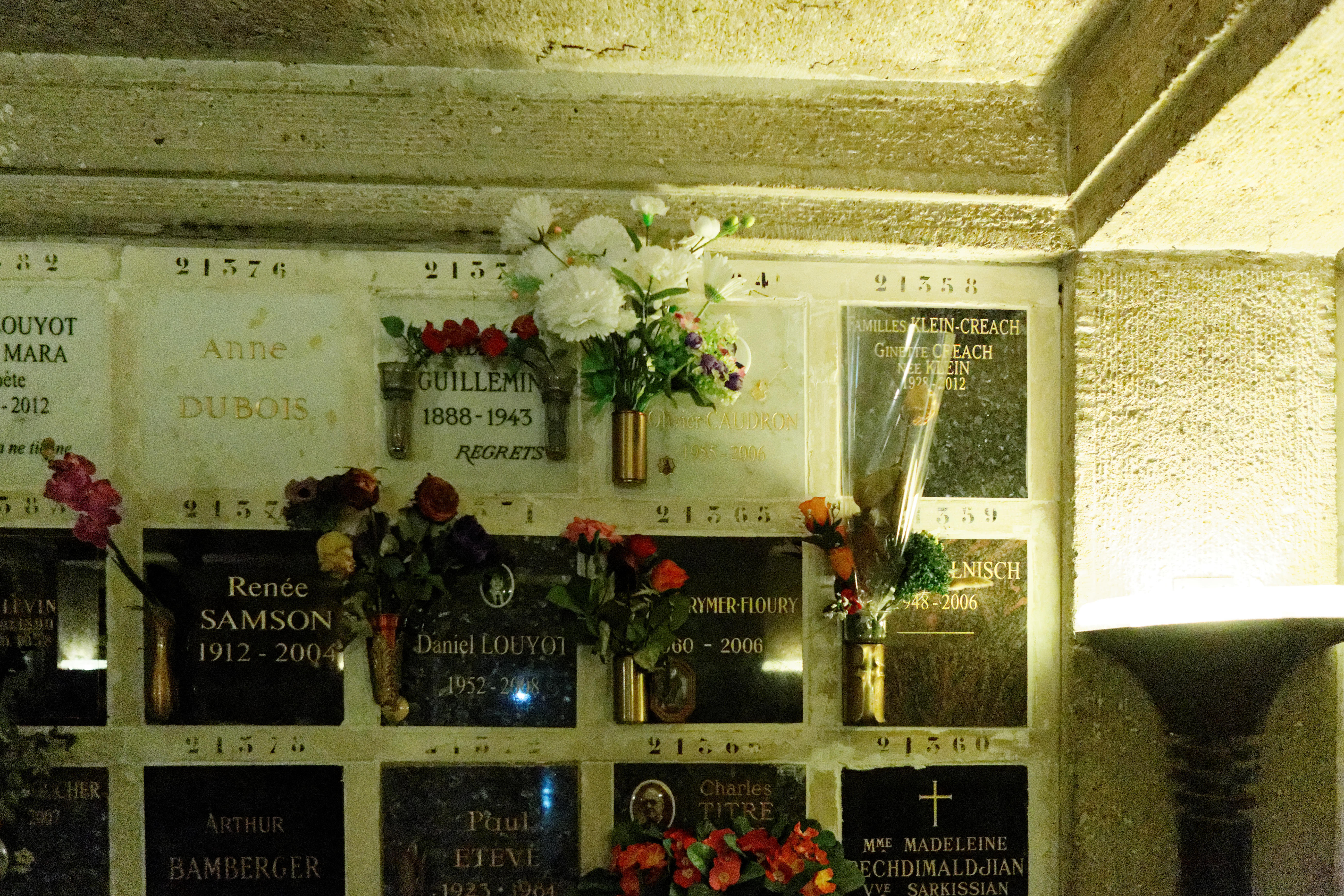 Cases du columbarium du cimetière du Père-Lachaise.